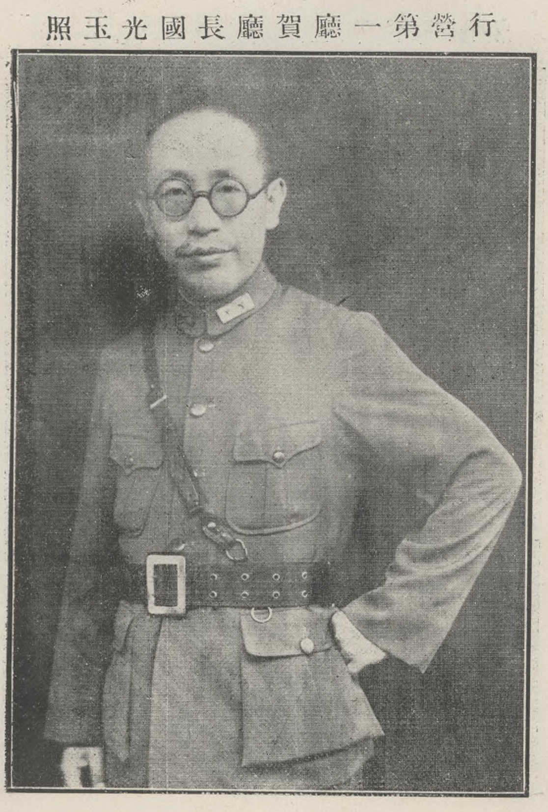 中文（台灣）: 感化月刊1933-1935